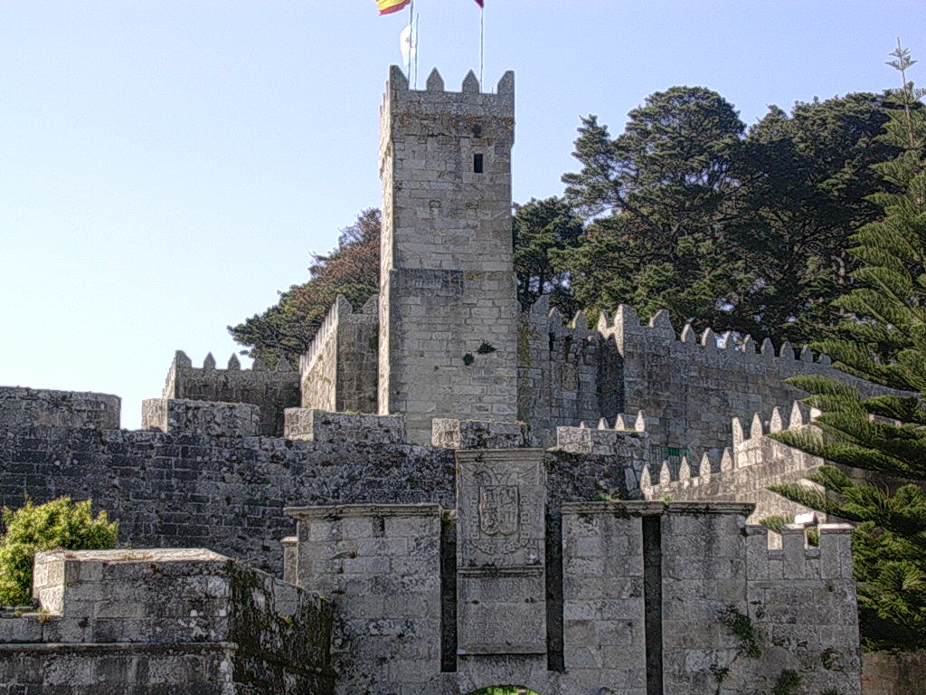 Castelo de Monterreal